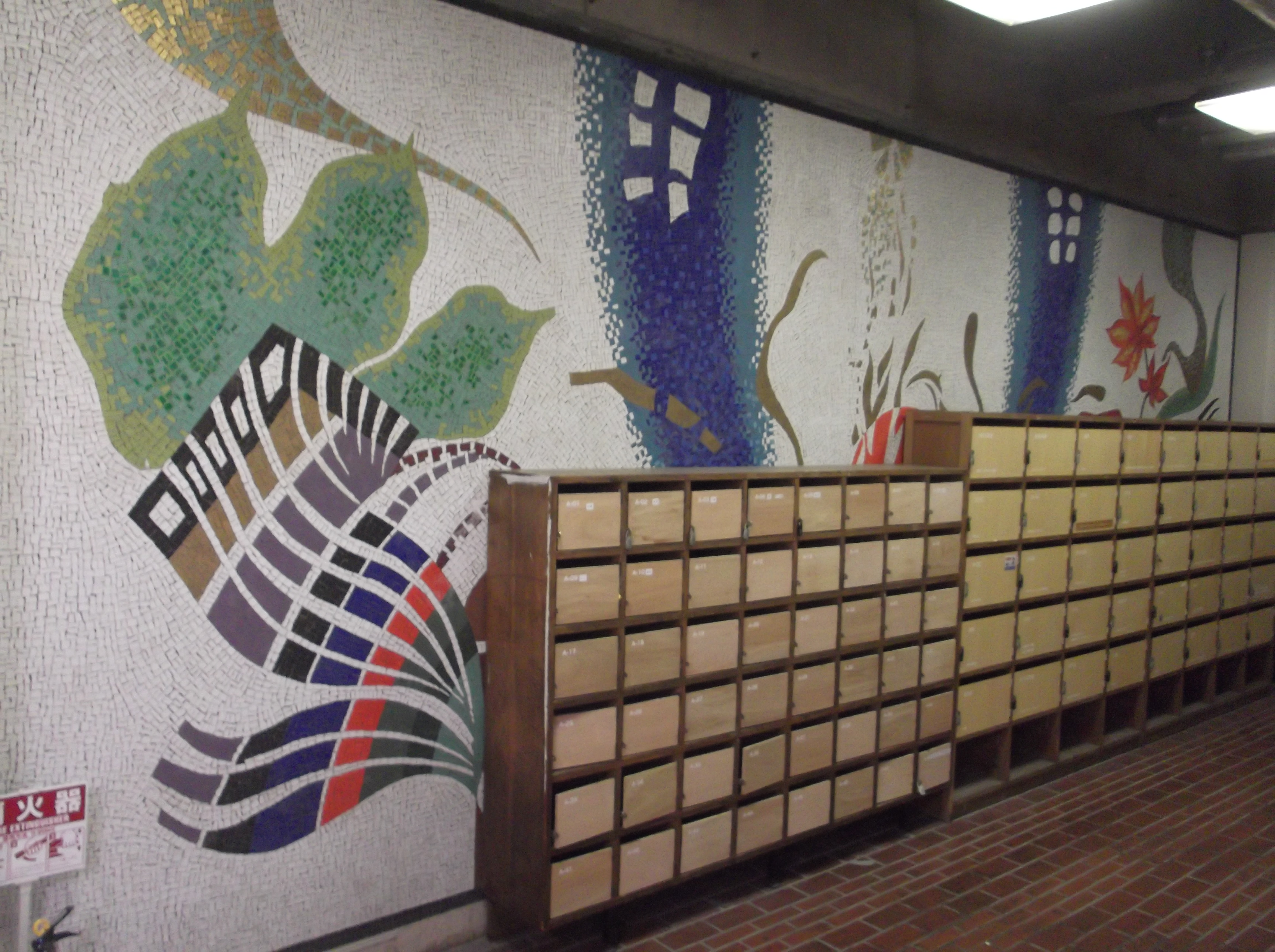 アーツ千代田３３３１の内部の壁画。練成中学校時代のものと思います。